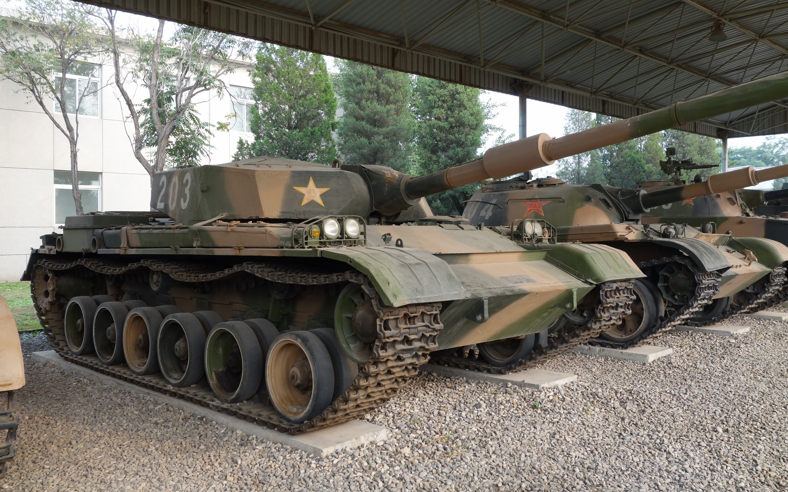 风暴-Ⅰ(即85式) 主战坦克. 未定型生产, 仅有的样车保存在坦克博物馆.